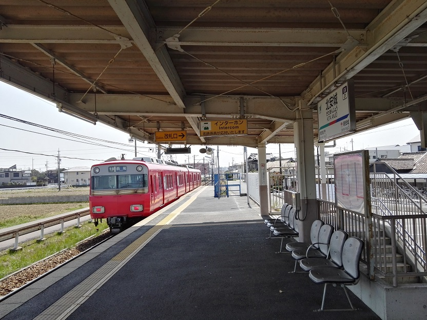 Kita anjo station platform